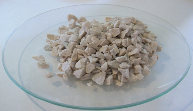 CaCO3